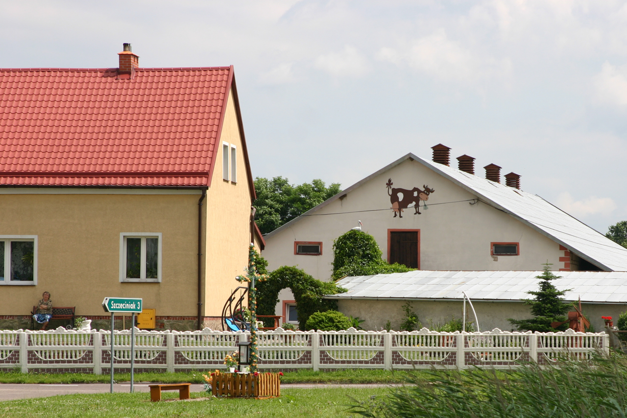 Solanka, Polska, powiat kętrzyński.